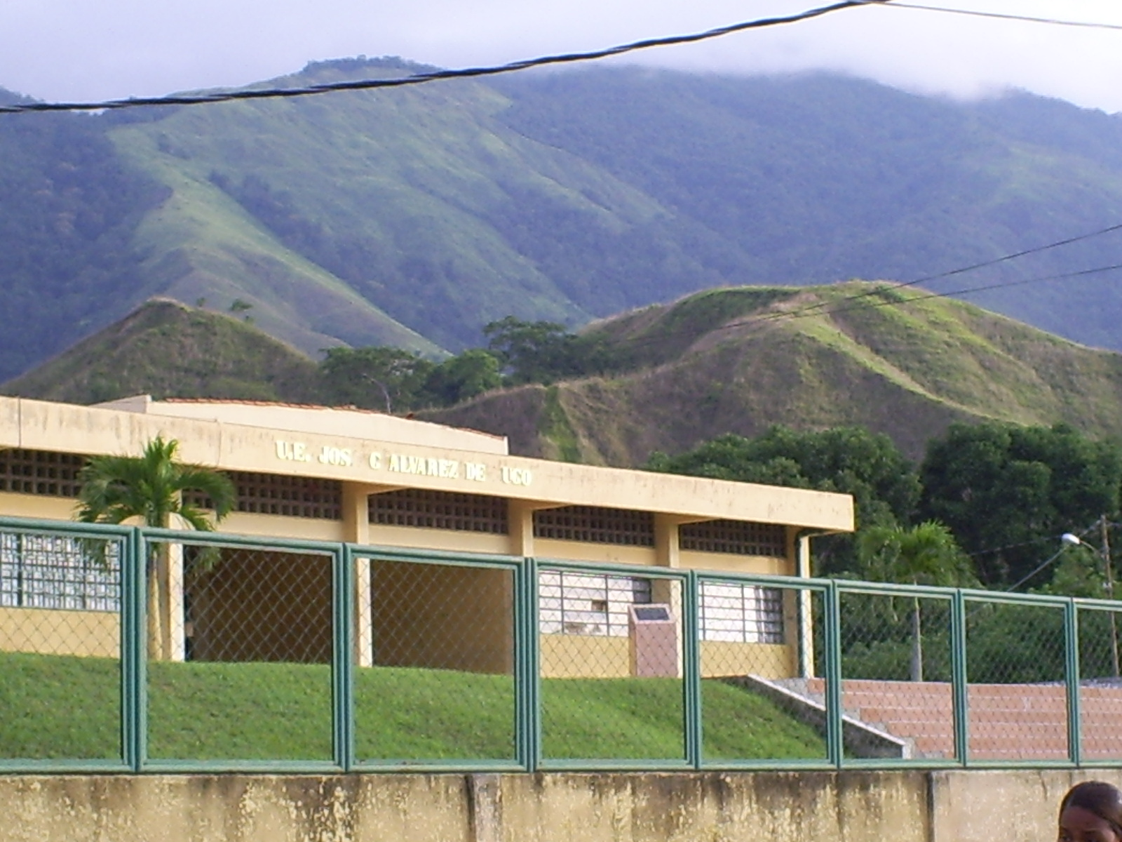 Liceo J. G. Álvarez de Lugo